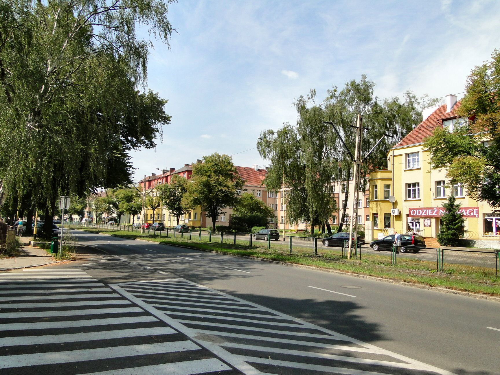 Szczecin ul. Mickiewicza